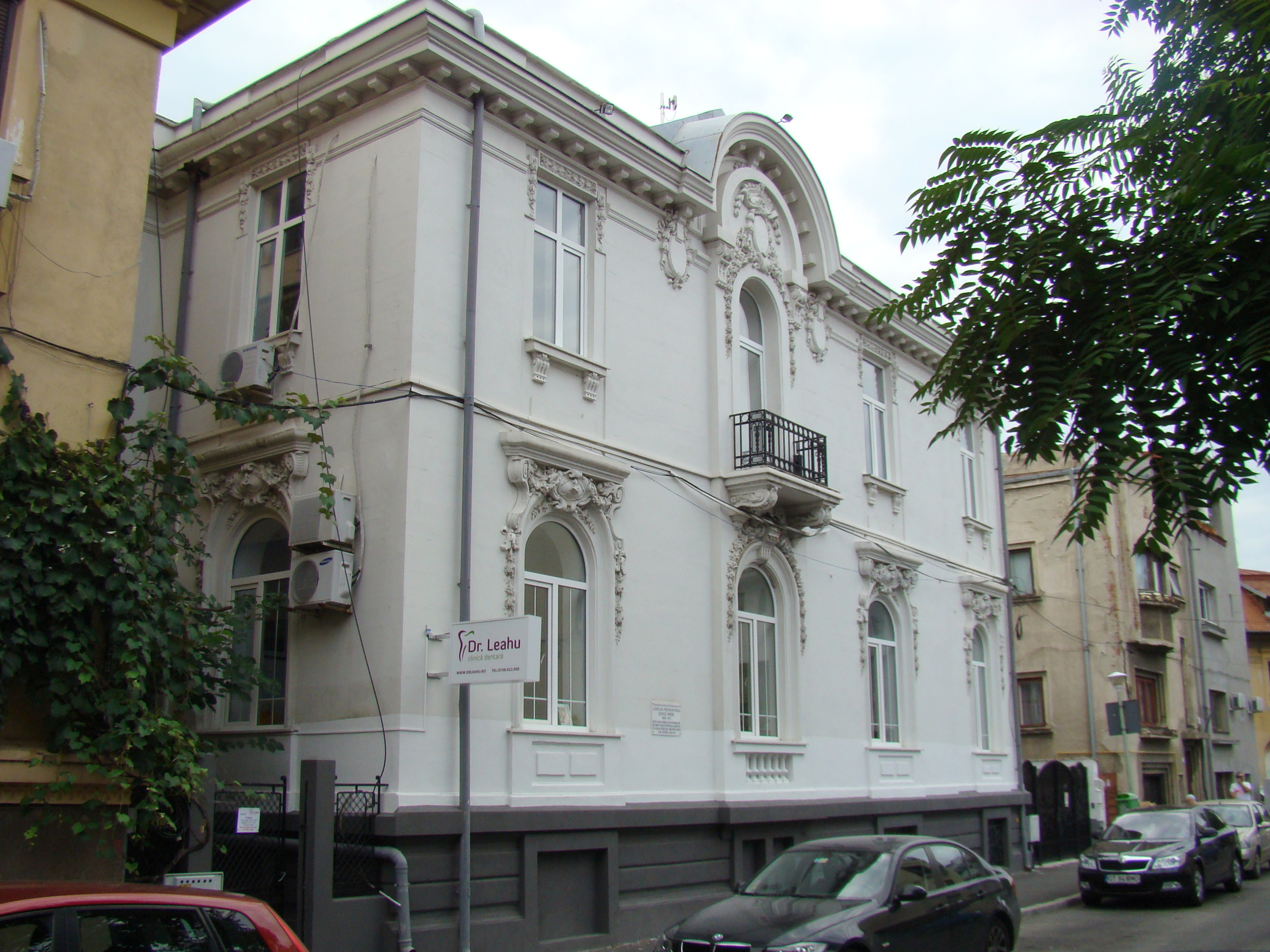 Casa George Murnu